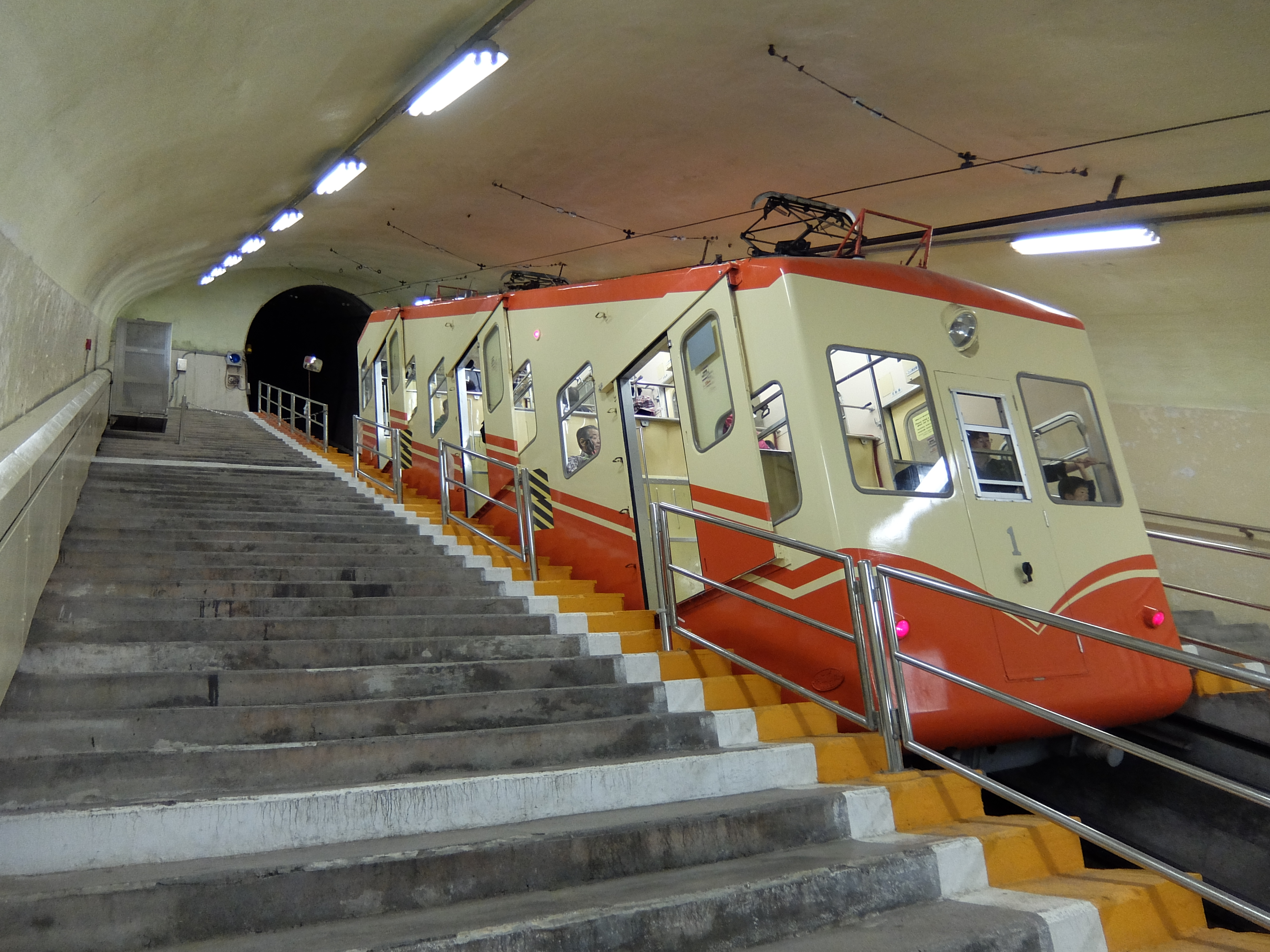 黒部湖駅 ホームの様子